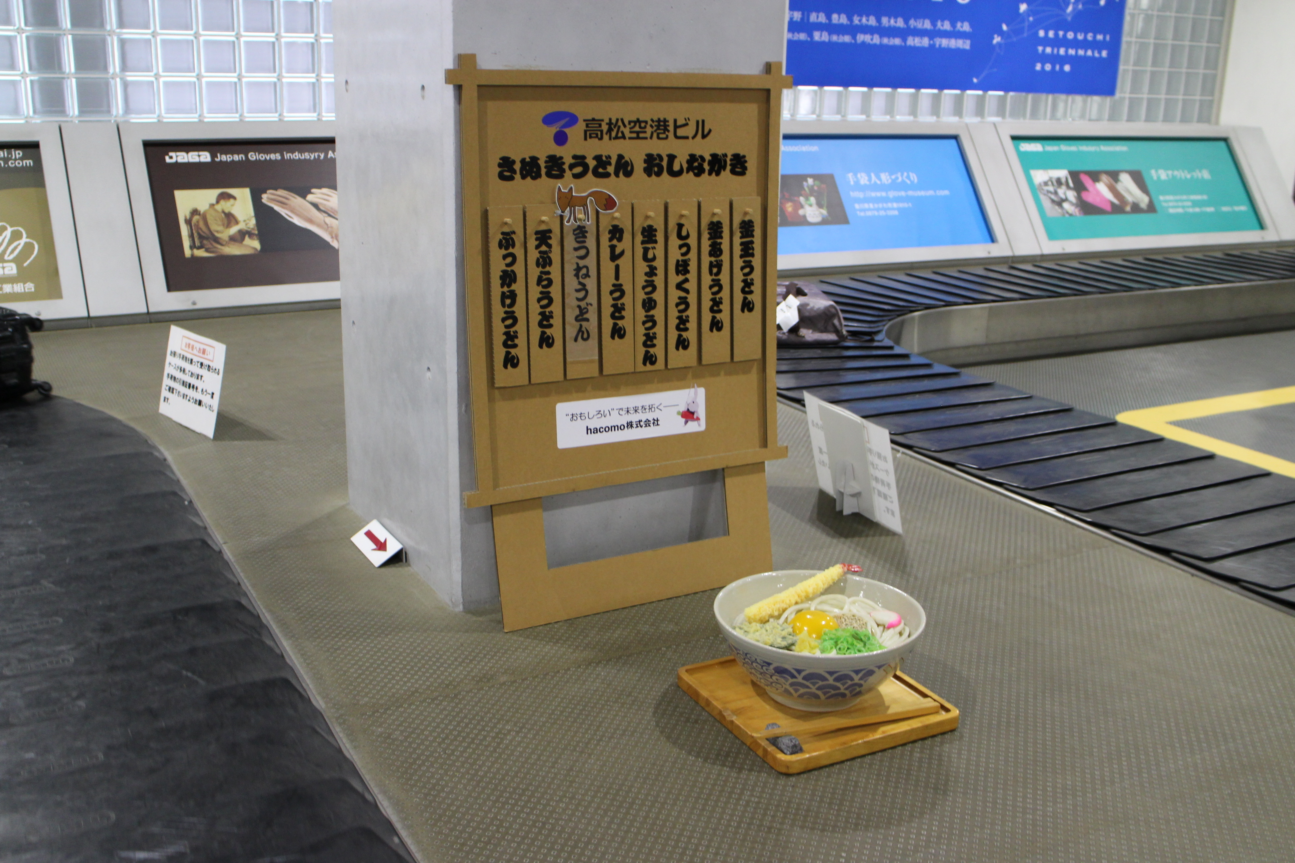 高松空港の手荷物受け取り場に設置されたさぬきうどんの模型とおしながき